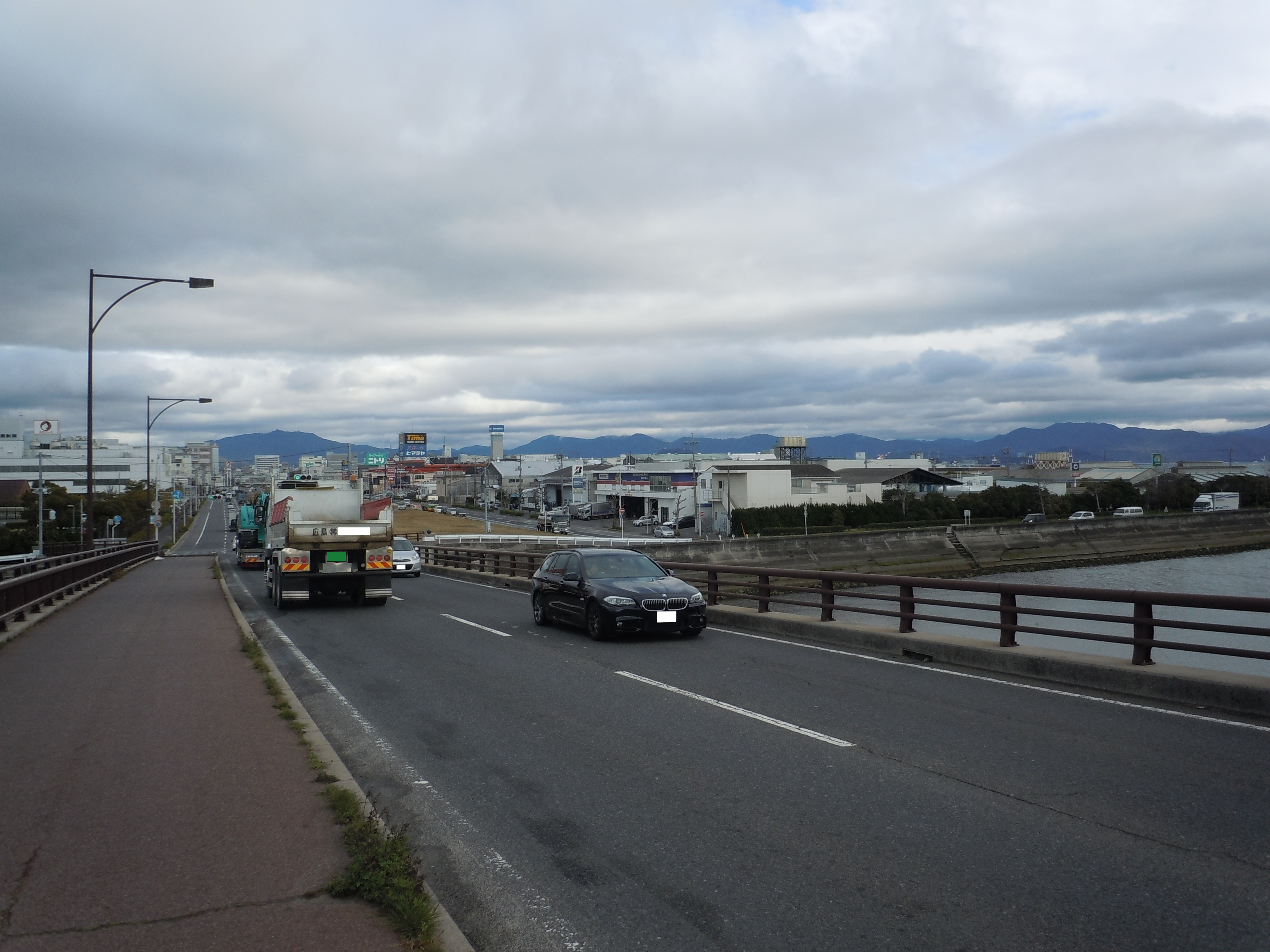 商工センター